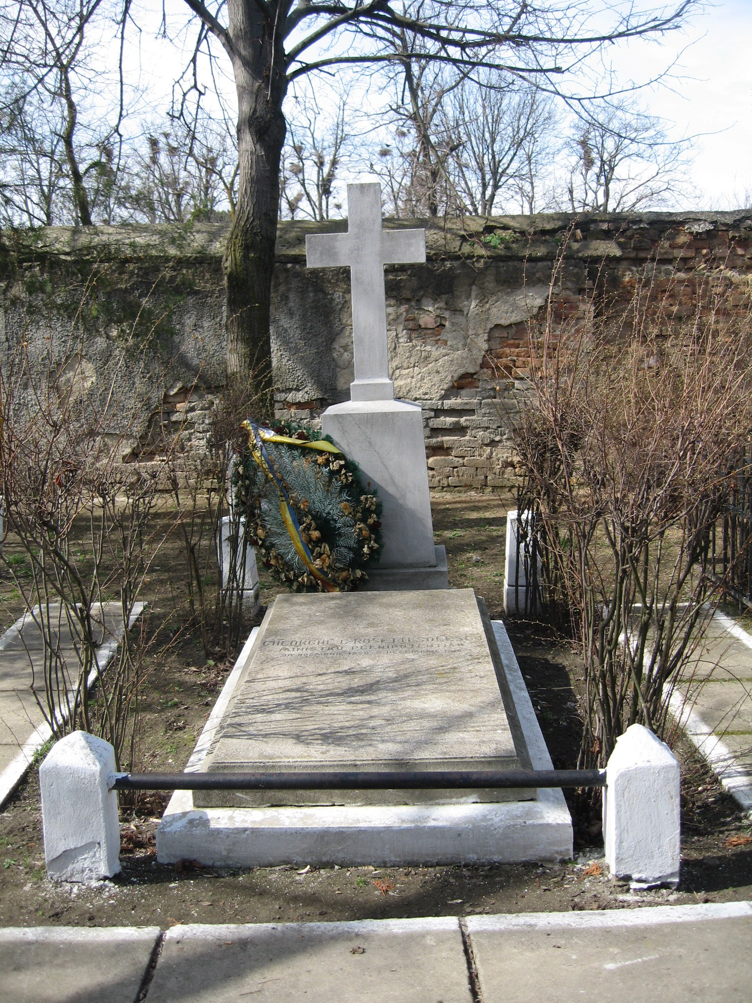 Conacul din Soleşti 03